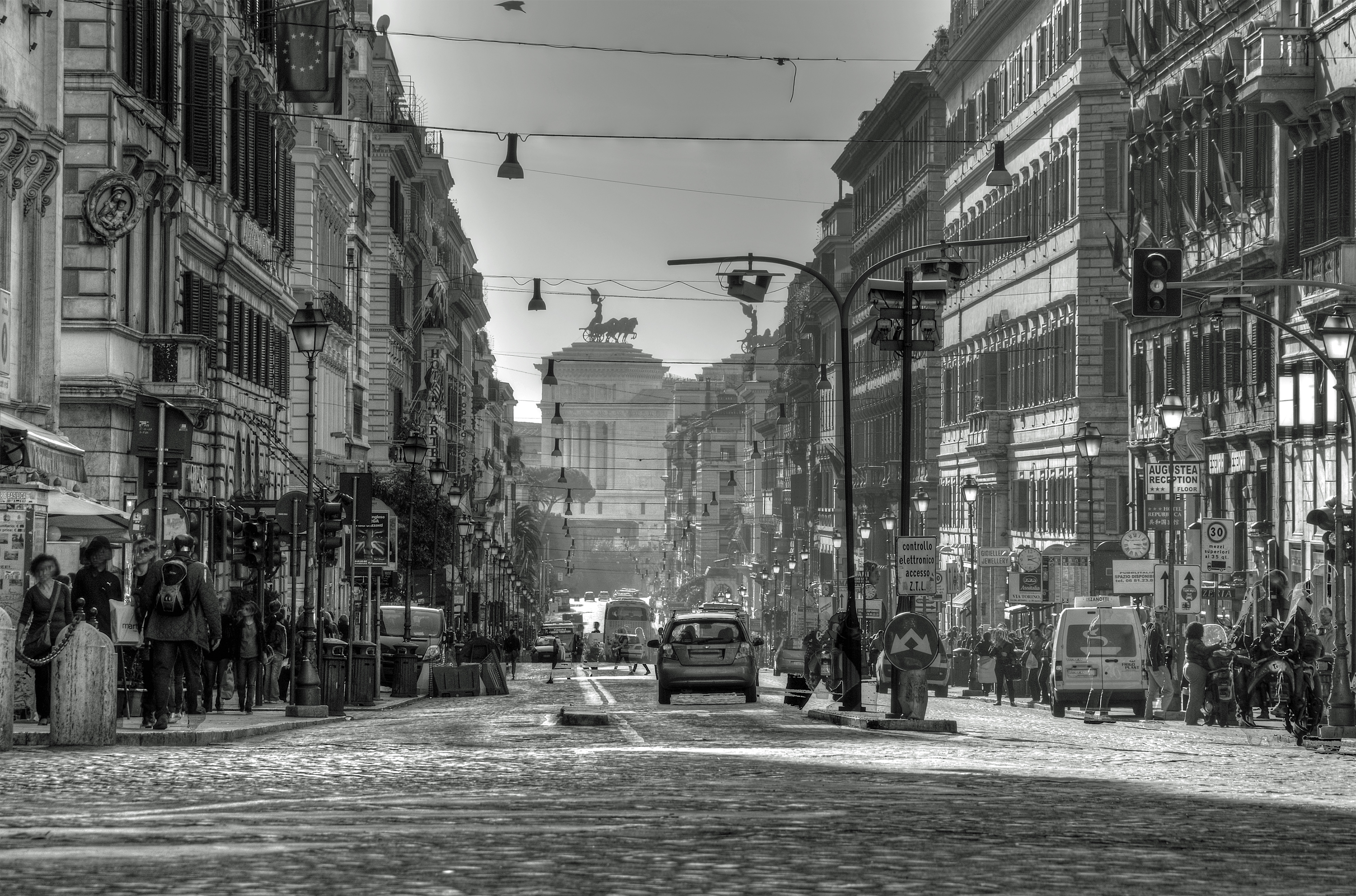 Via Nazionale - Roma, Italia